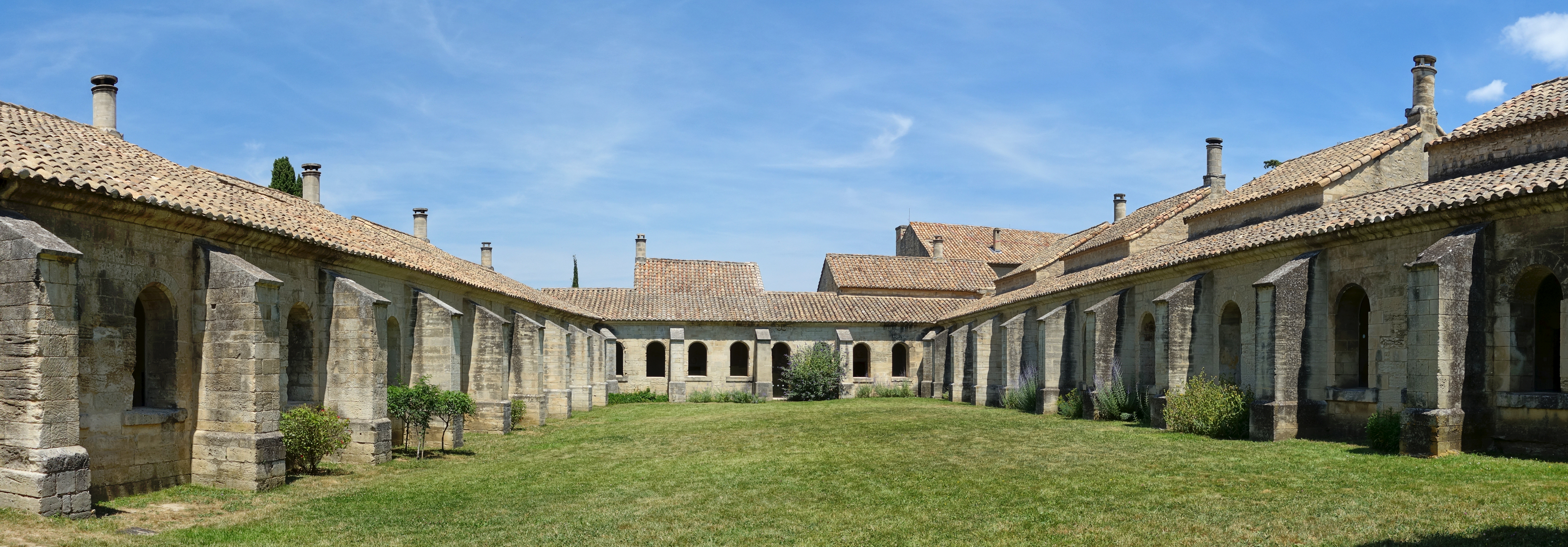 Le grand cloître de la Chartreuse du Val de Bénédiction à Villeneuve-lès-Avignon.